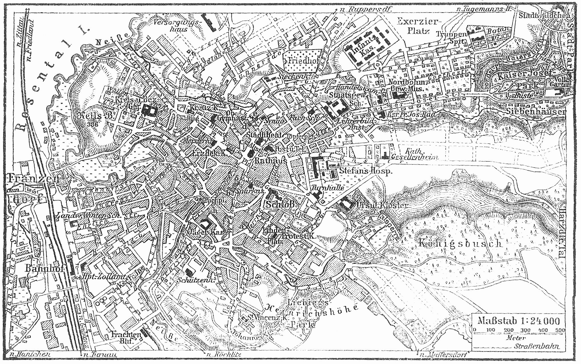 Reichenberg in Böhmen, Stadtplan der Stadt von ca. 1900